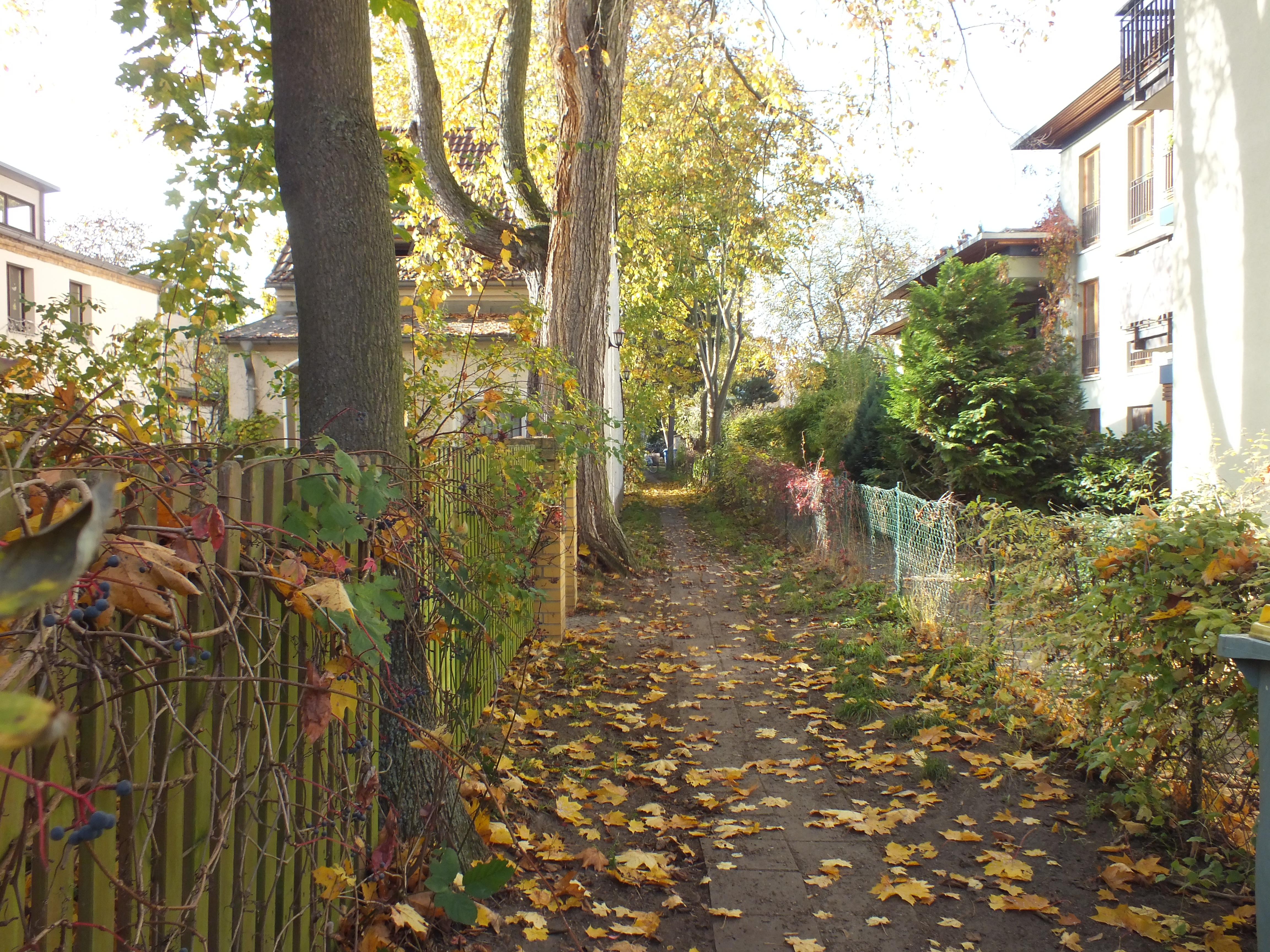 Straße in Berlin-Friedrichshagen: Scharnweberstraße 106 A–106C: öffentl. Verbindungsgang zur Bölschestraße